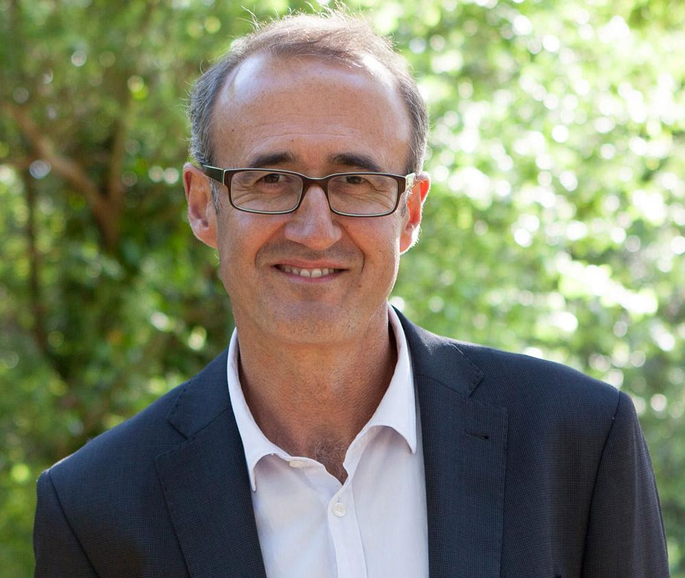 Juan González 2105